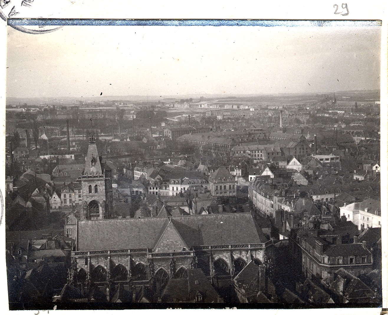 Vue plongeante sur l'église Saint-Germain à Amiens (Somme). Entre 1914 et 1918 Guerre 1914-1918.